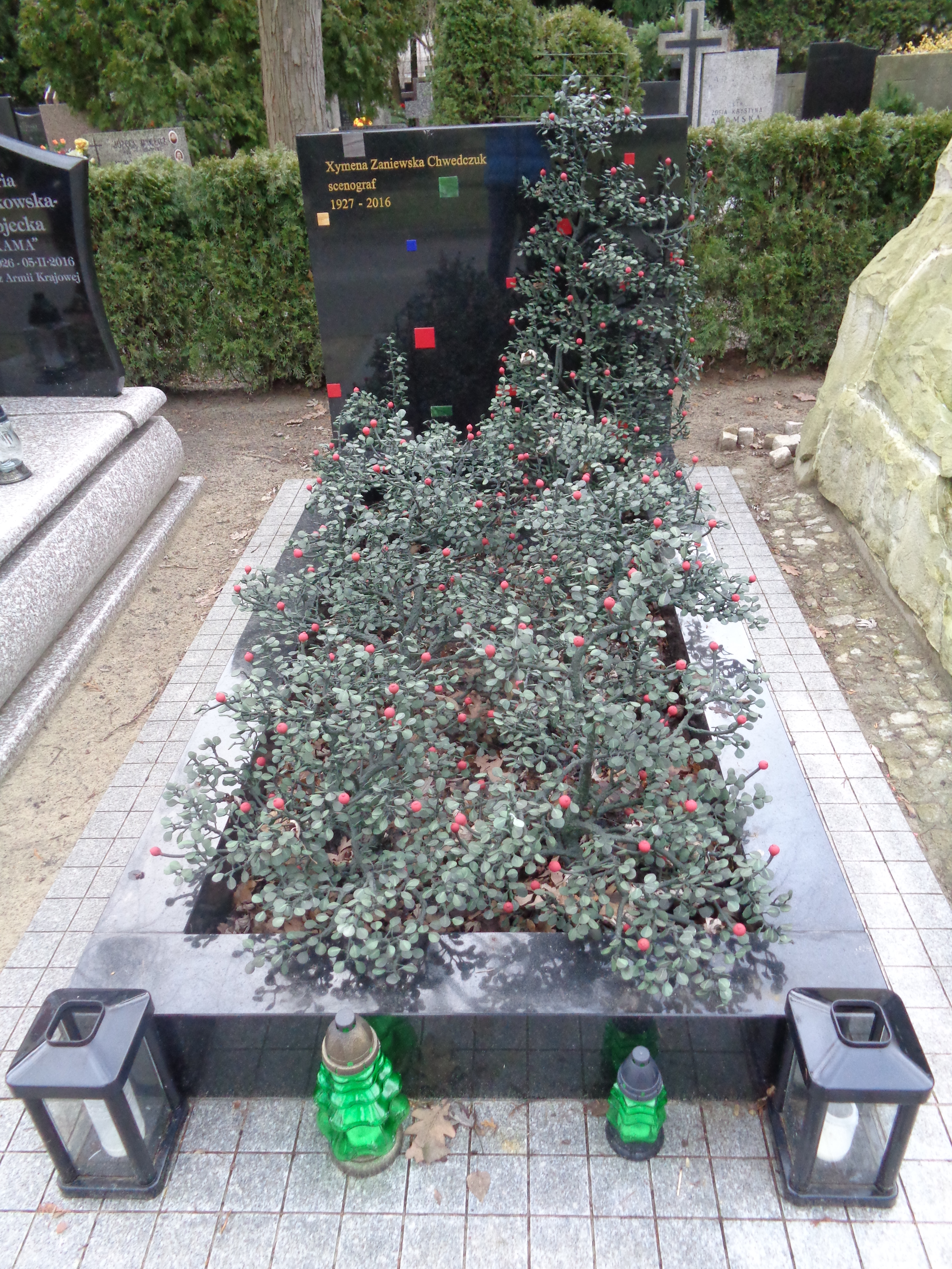 Xymena Zaniewska (projektantka mody i scenograf), grób na cmentarzu wojskowym na Powązkach.